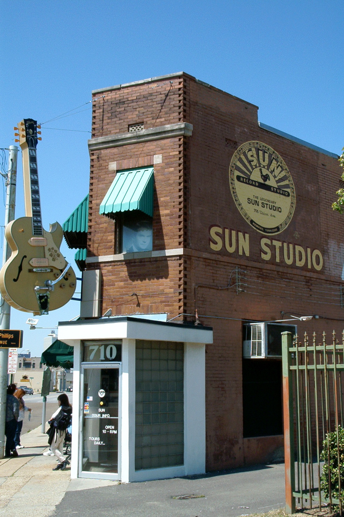 El Estudio Sun, donde Johnny Cssh grabó la mayor de su material editado en Sun Records Sun Studio, Memphis, Tennessee. © Jeremy Atherton, 2002.